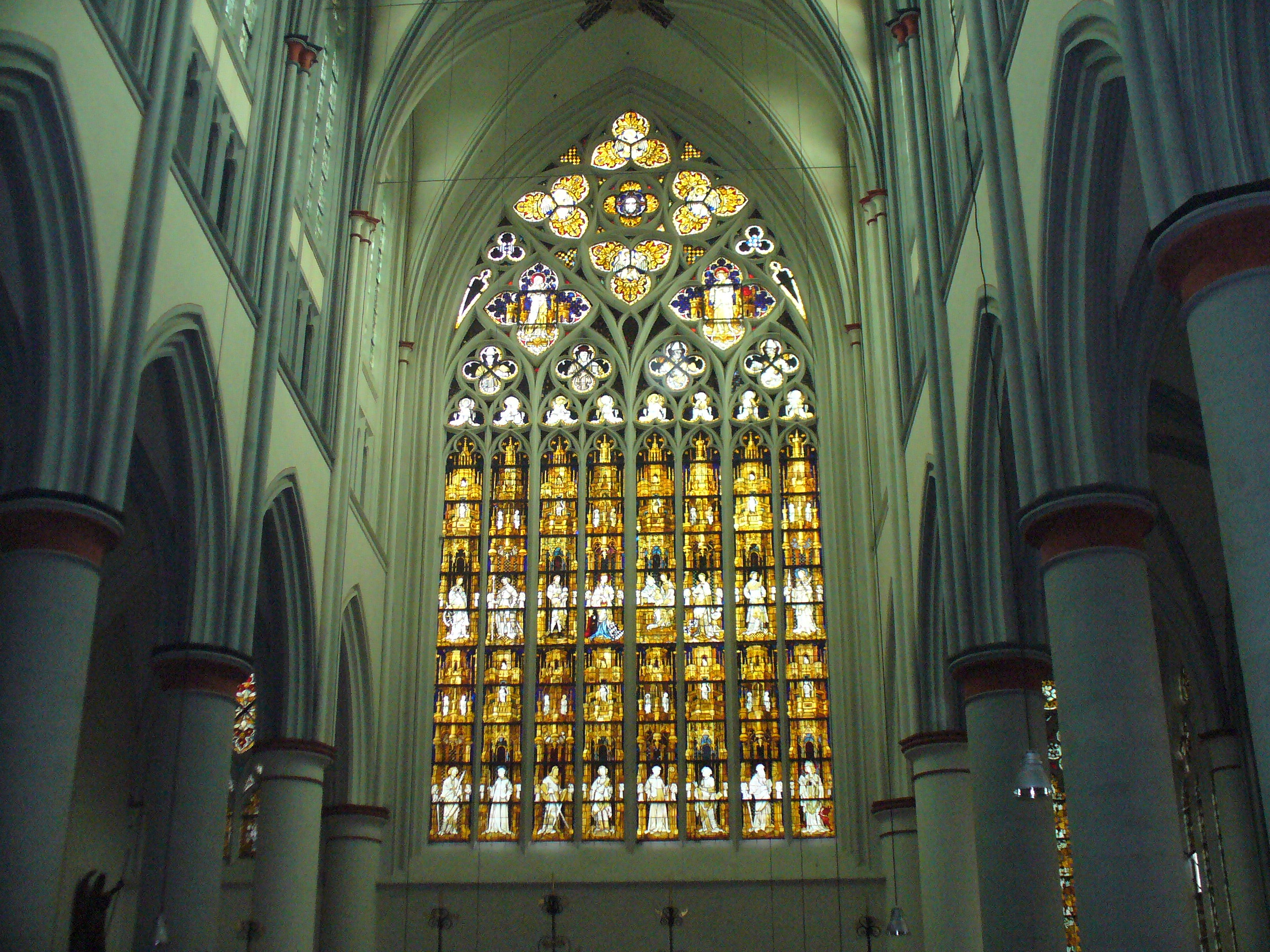 Altenberger Dom, Odenthal